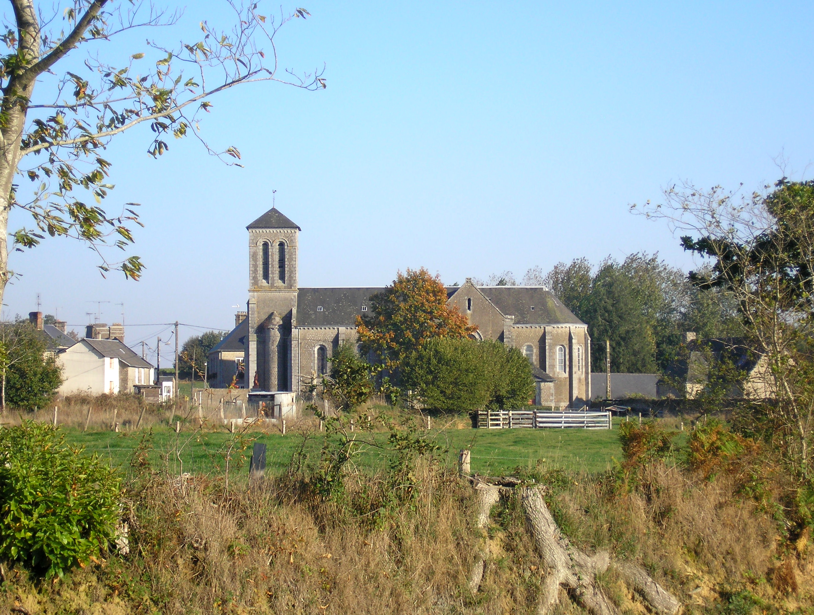 Heussé (Normandie, France). L'église Saint-Pierre.